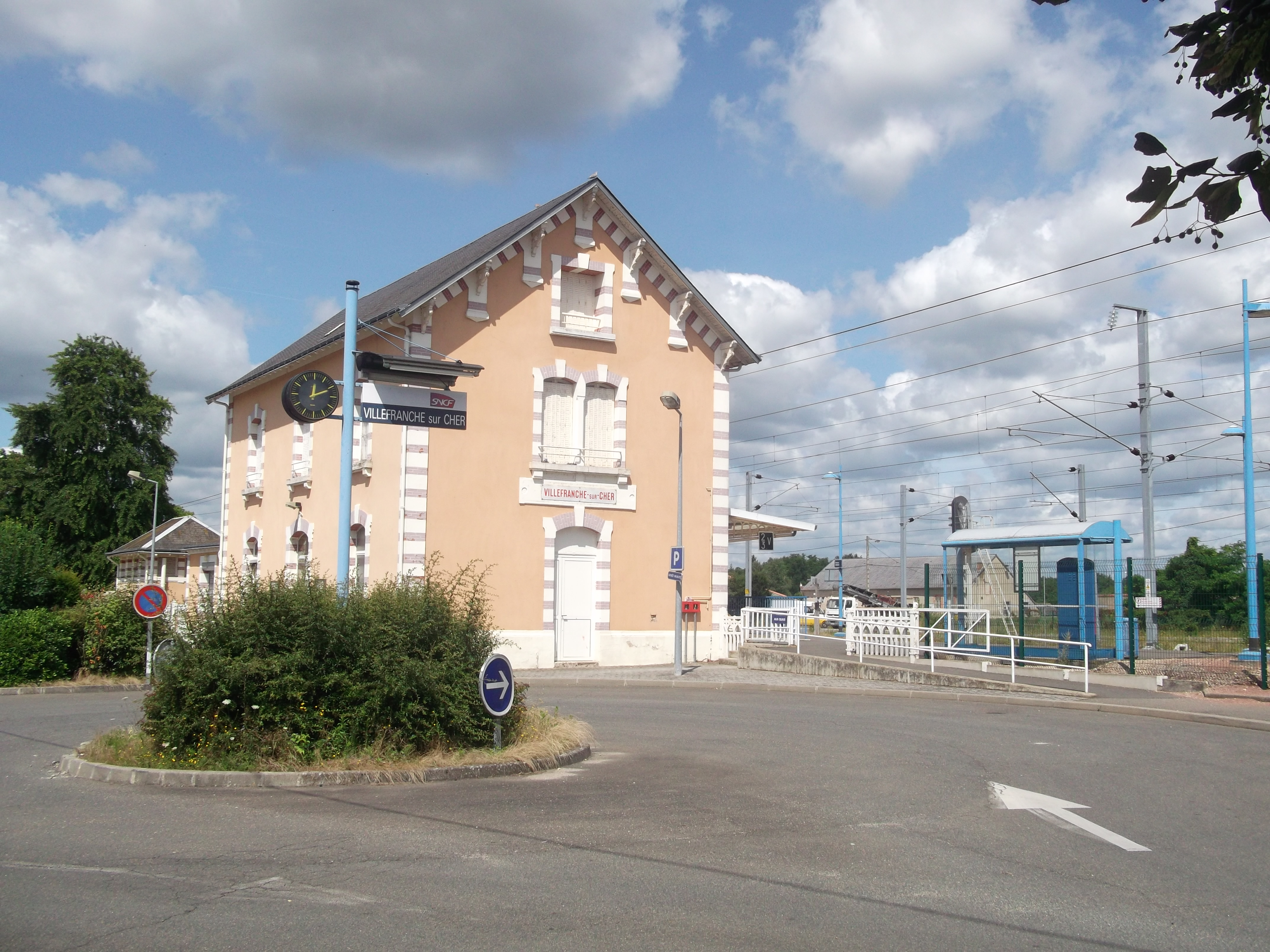 Gare de Villefranche-sur-Cher, vue extérieur